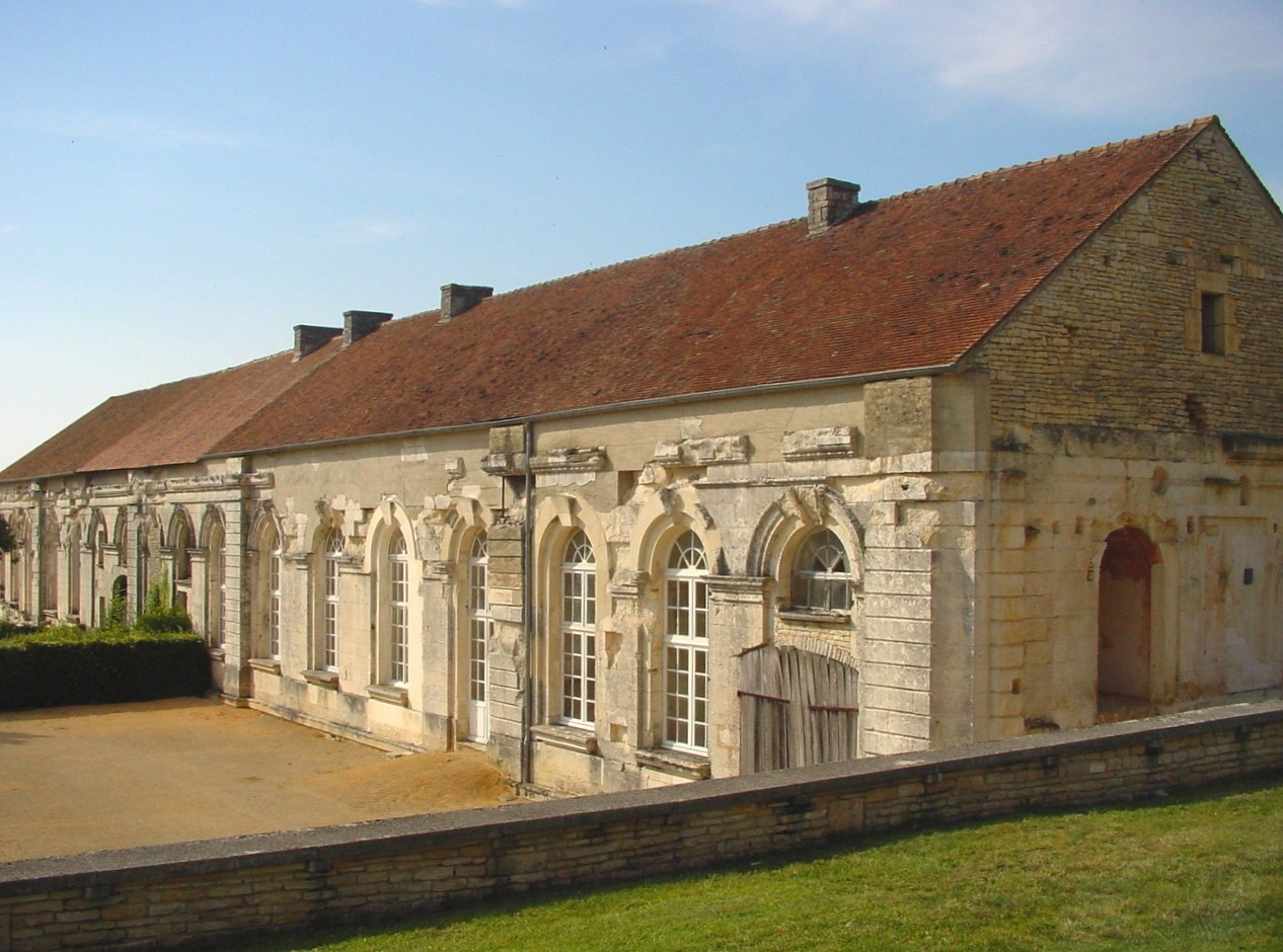 Abbaye de Molesme (Côte-d'Or, France)